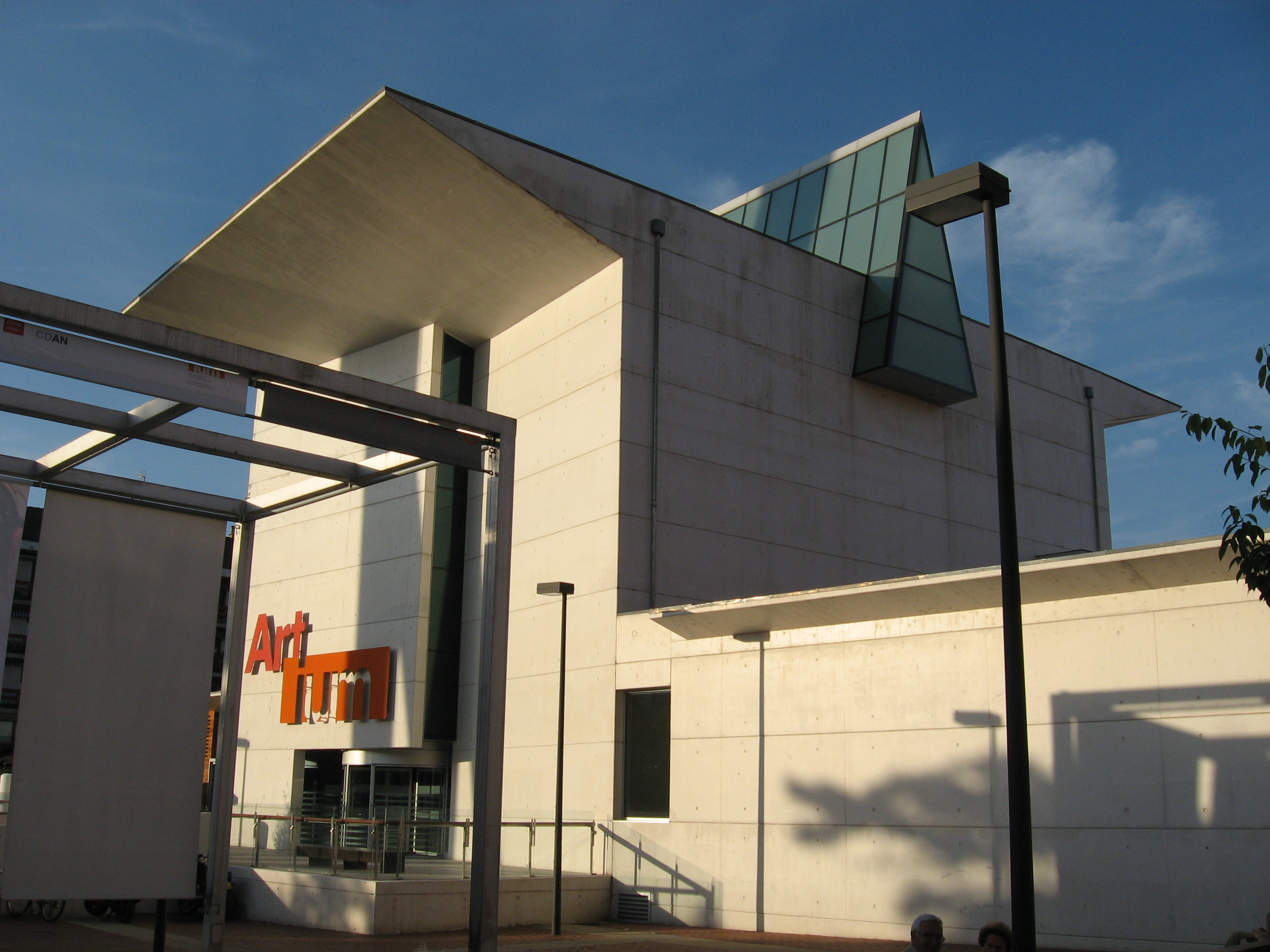 Desc: Museo de Arte Moderno, Artium, de Vitoria-Gasteiz.